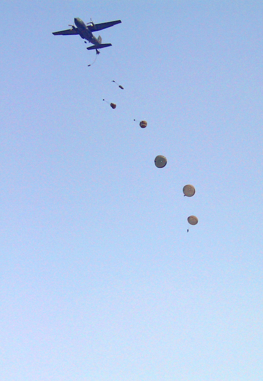 Eine Transall C-160 mit Fallschirmspringer der deutschen Luftwaffe auf der ILA 2002.